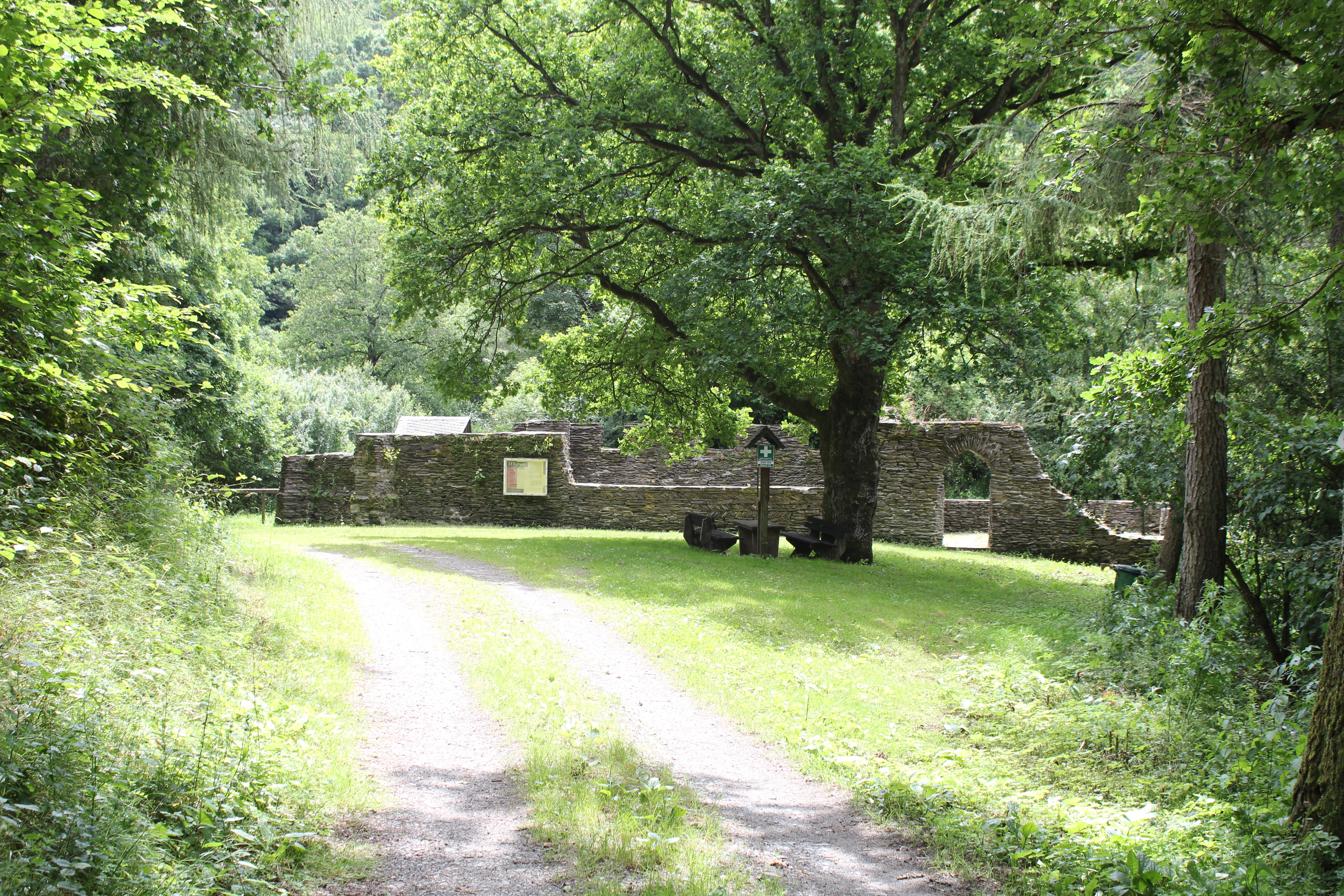 Frontansicht der Klosterruine Mädburg bei Kehrig (MYK)